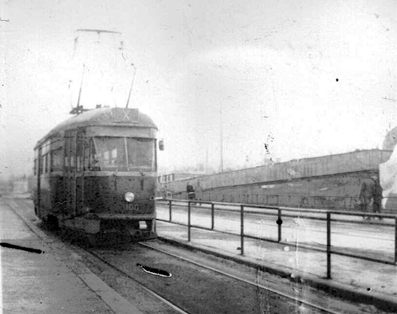 Praha, Vinohrady, Vinohradská, zastávka Želivského - tramvaj T1.